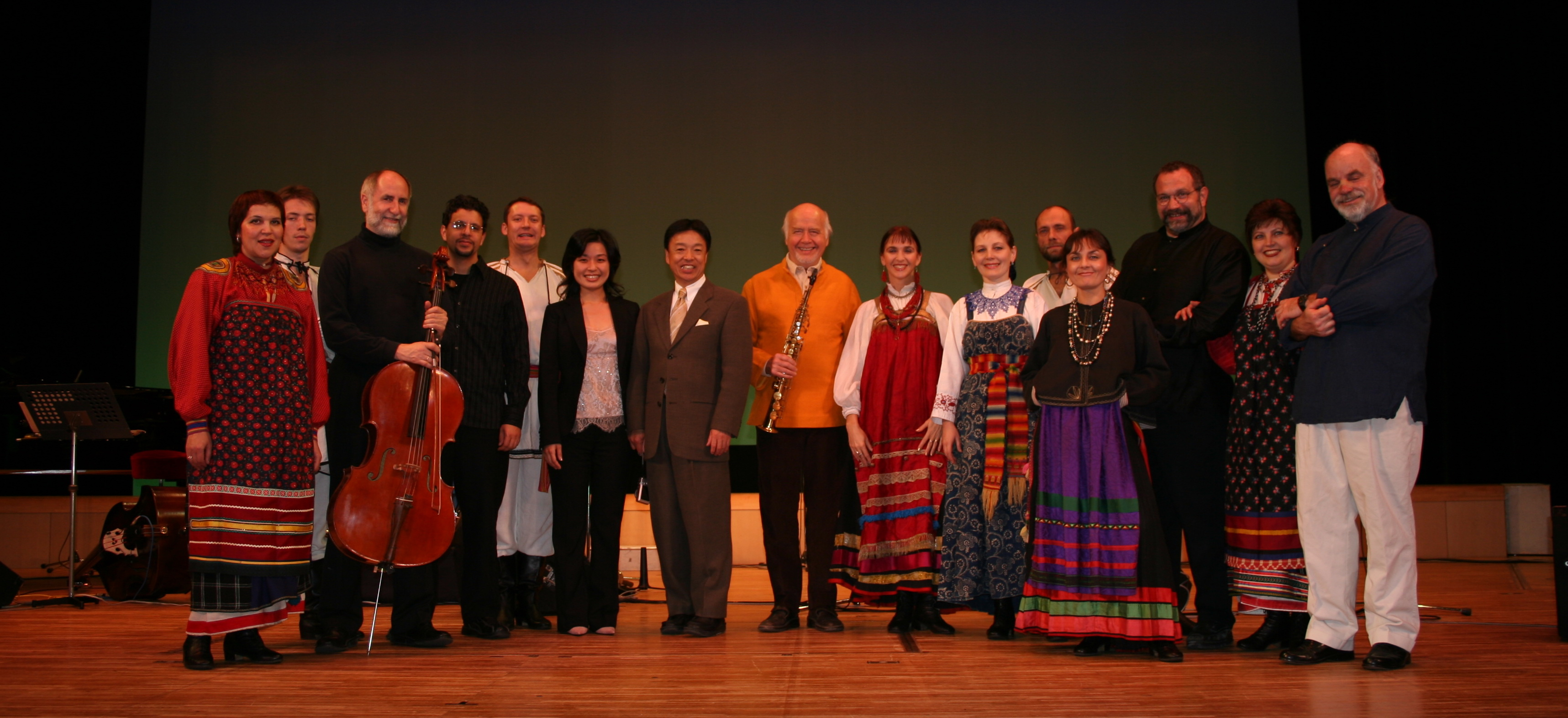 Ансамбль Дмитрия Покровского на концерте с Полом Уинтером в Японии. 2005 год.